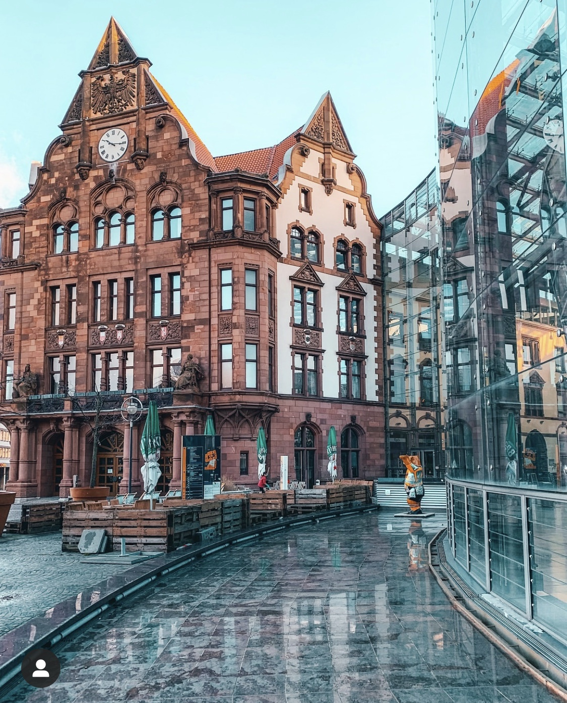 Stadthaus mit Berswordthalle am Friedensplatz